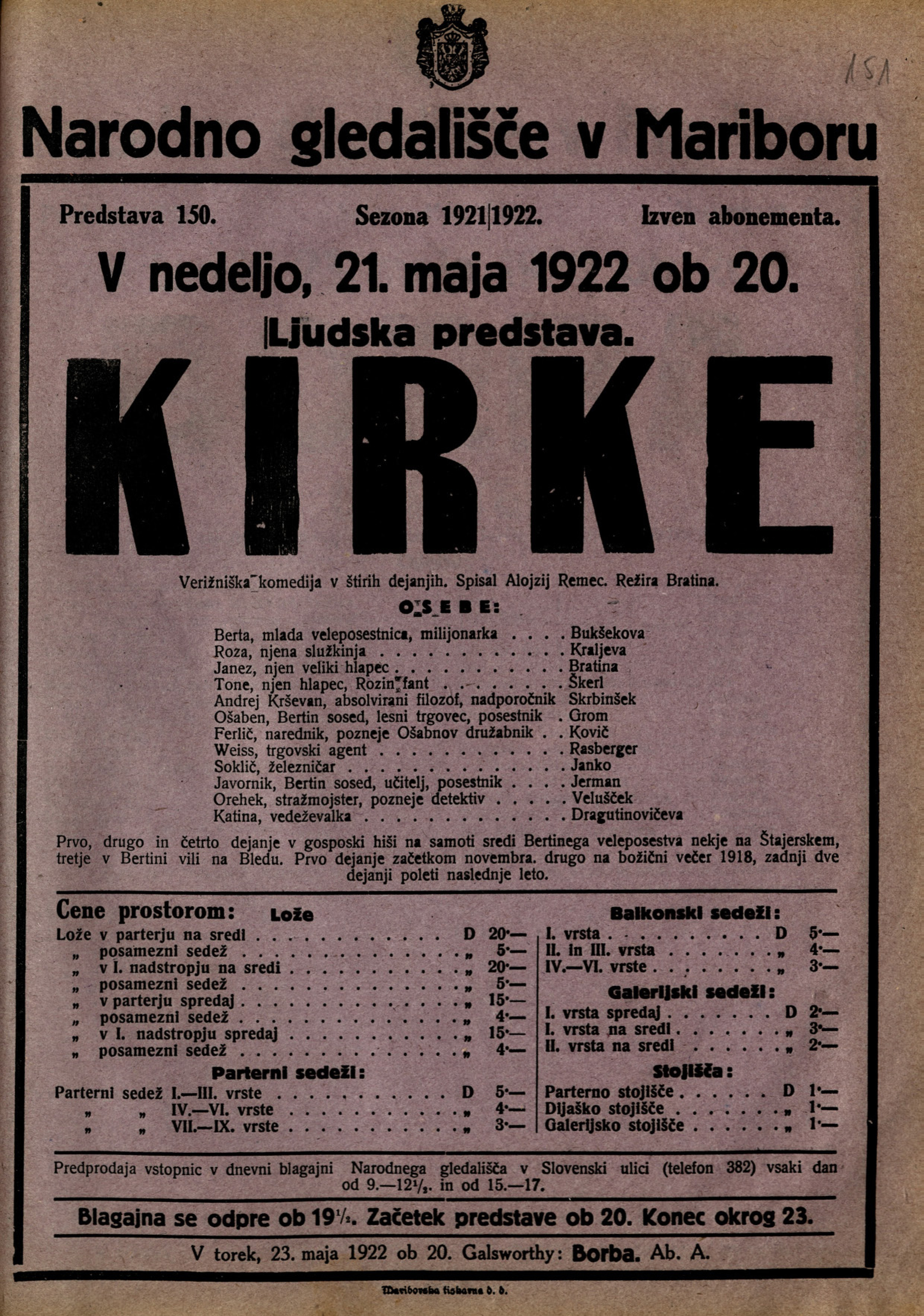 Plakat za predstavo Kirke v Narodnem gledališču v Mariboru.